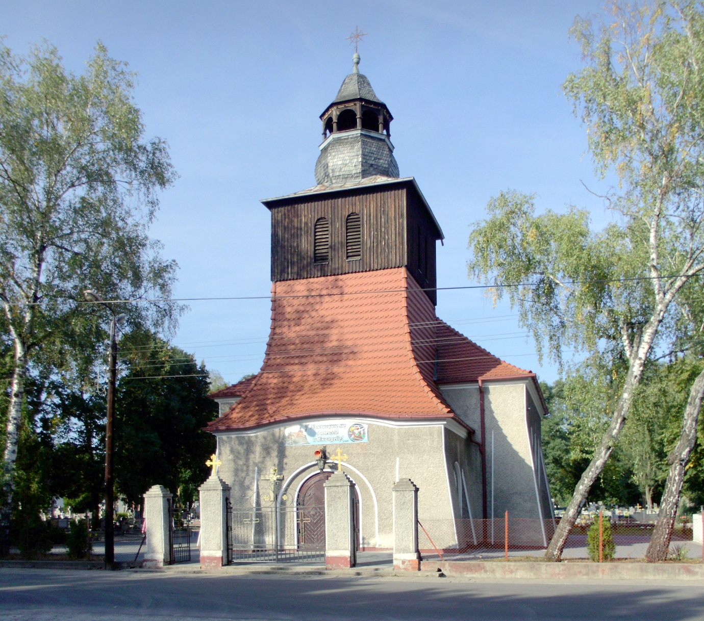 Bydgoszcz, ul. Kapliczna 1,, kościół cmentarny, ob. par. p.w. św. Stanisława Biskupa, 1923-1925; cmentarz (stara część)